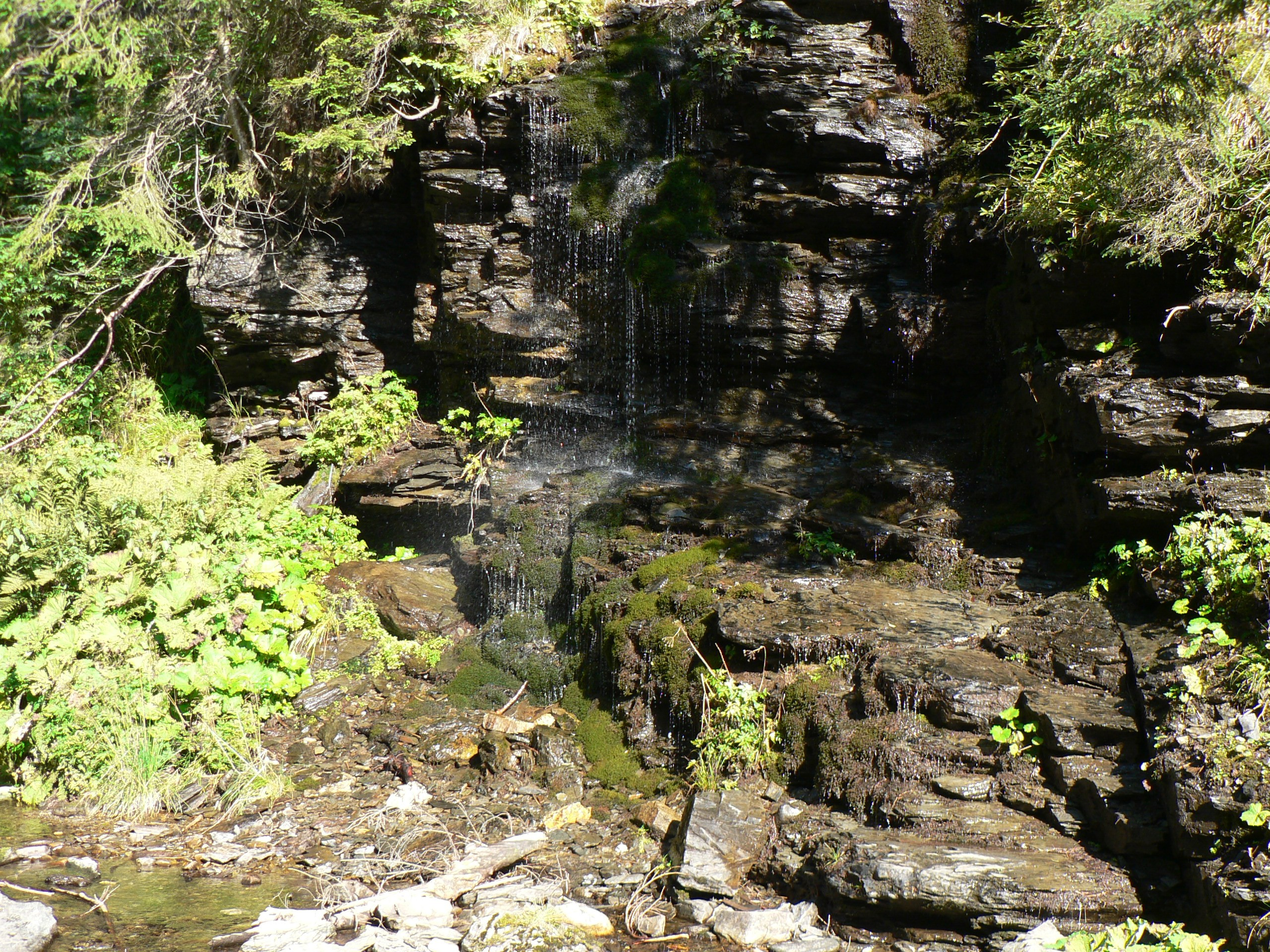 Vodopády Bílé Opavy